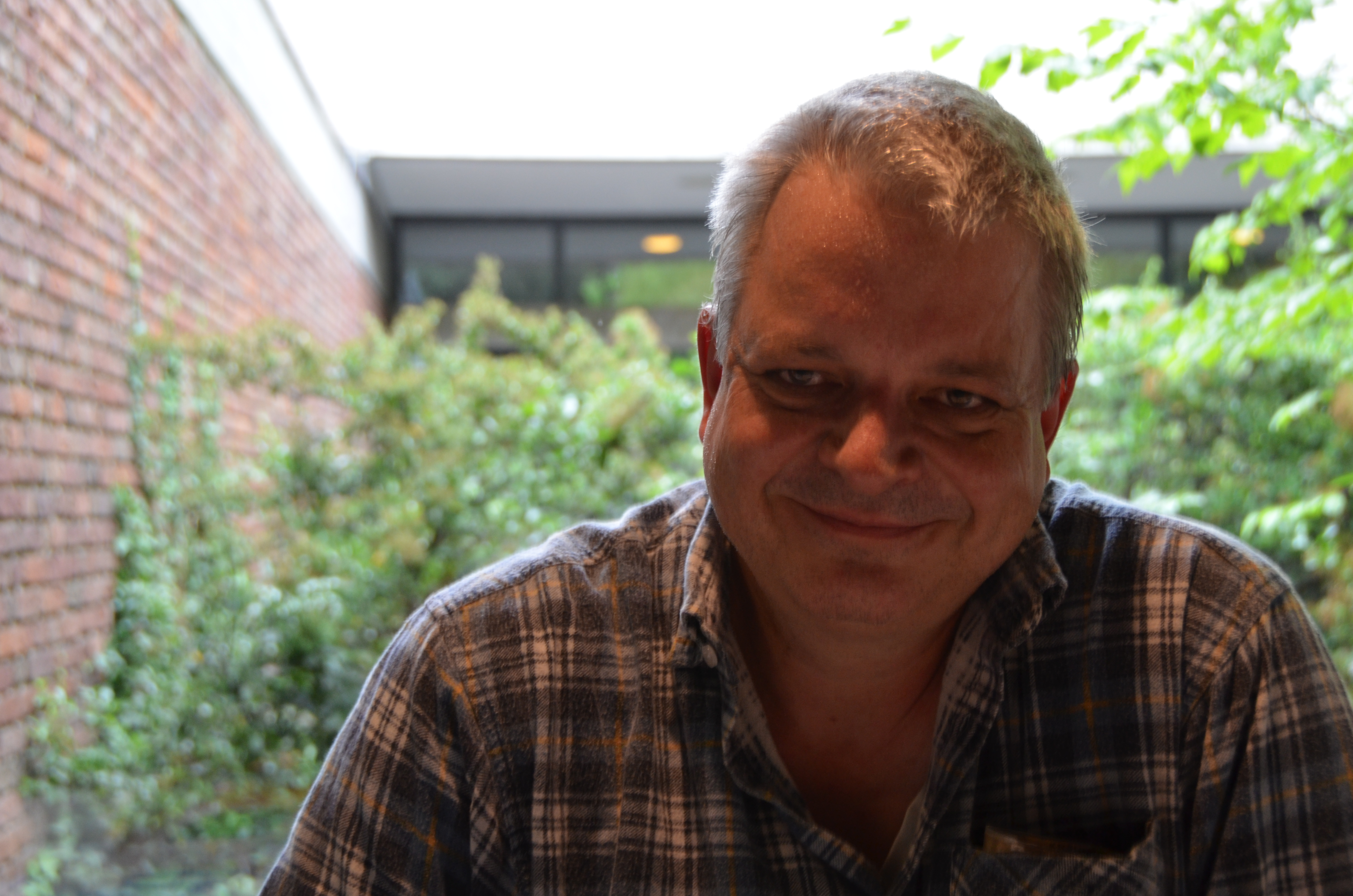 Ulf Stolterfoht am Lyrikmarkt des Poesiefestivals Berlin 2015